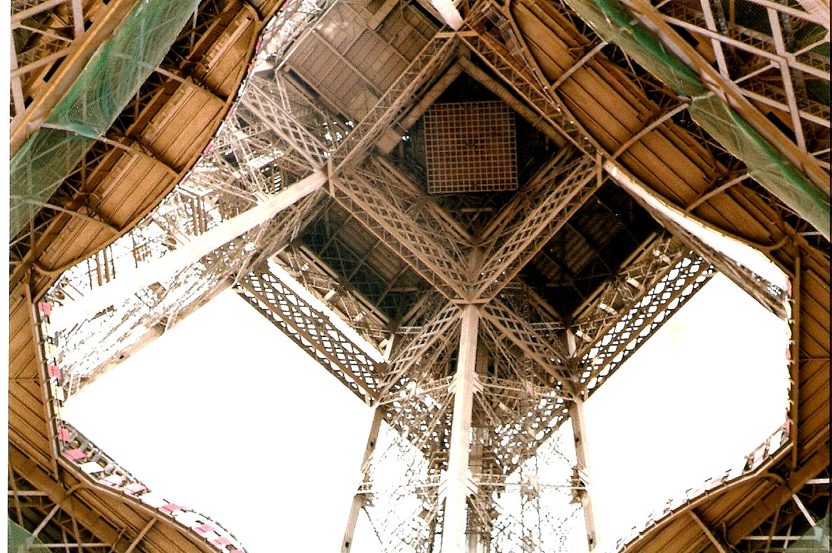 Curiosa vista del primer nivel de la Torre Eiffel, Paris, Francia. View from the button.